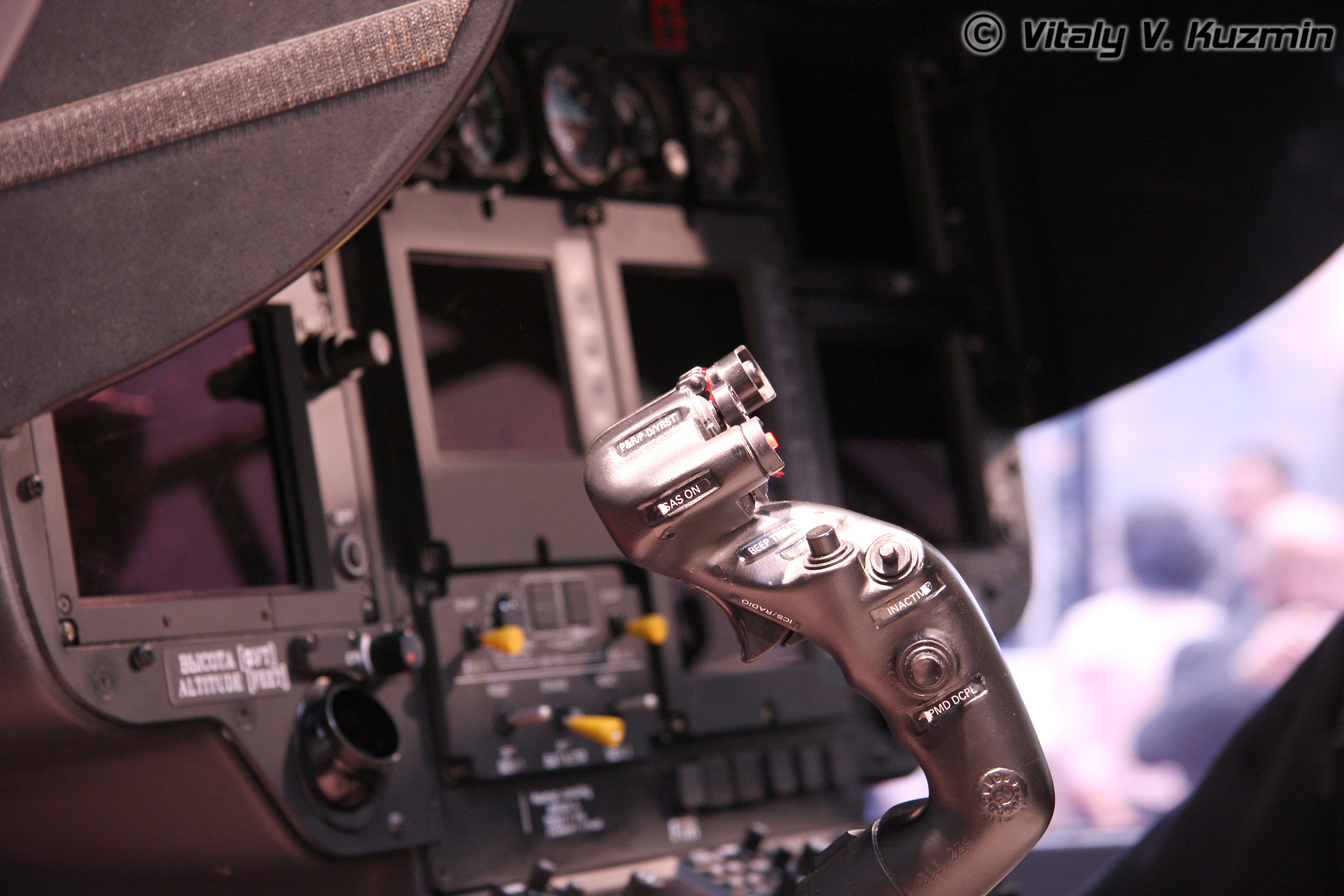 Eurocopter EC 145